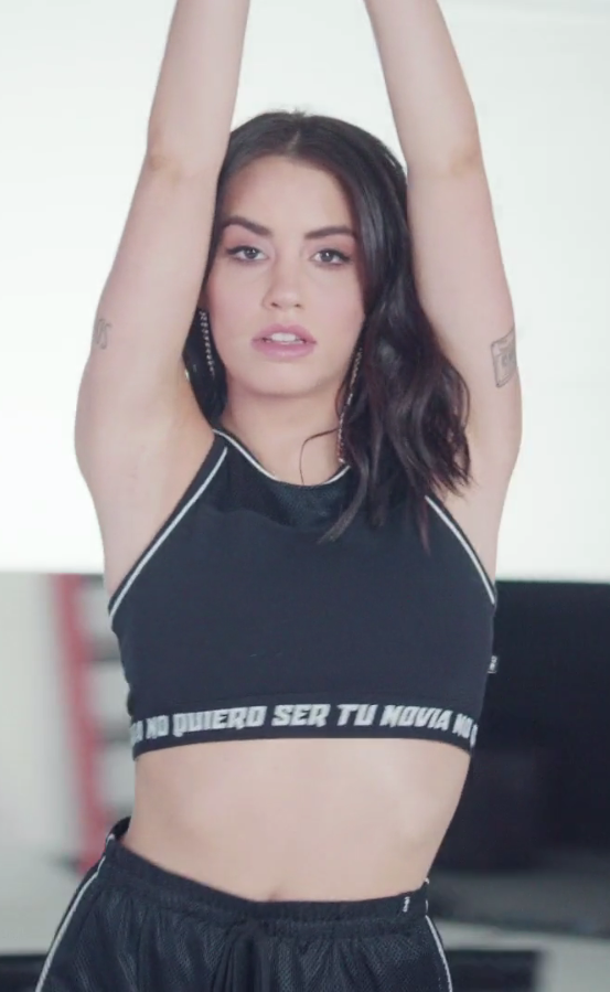 Lali en una sesión de fotos promocionando su marca de ropa